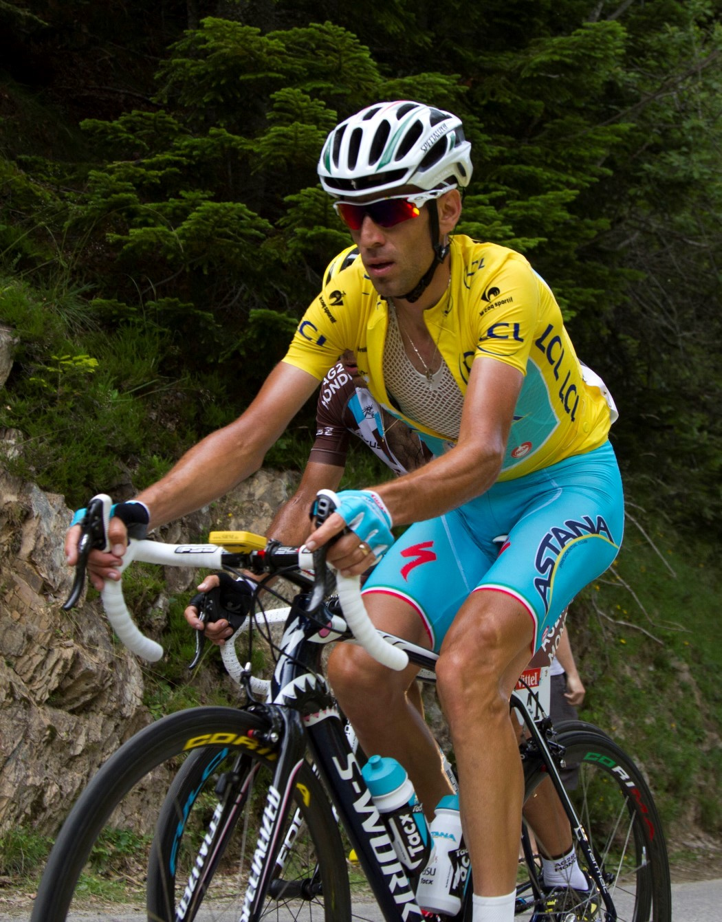 096 nibali